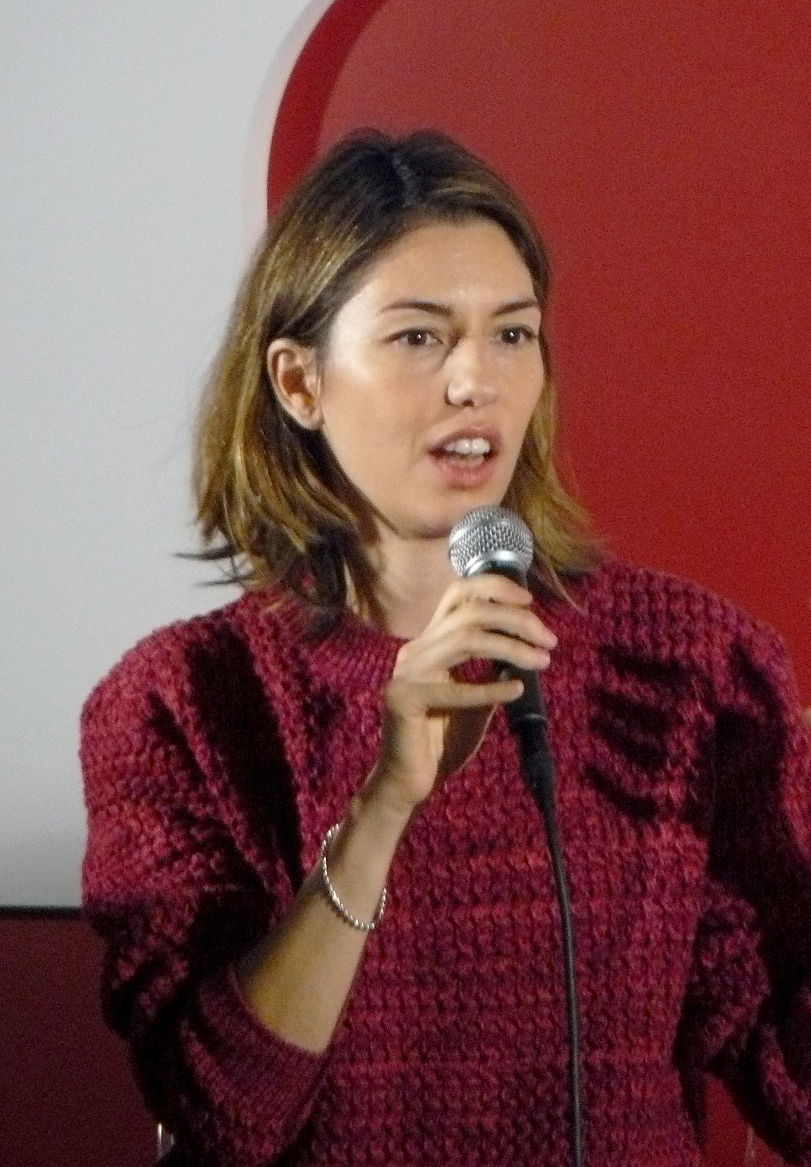 Sofia Coppola, le 7 novembre 2010 à la FNAC Montparnasse, lors d'une rencontre Masterclass à l'occasion de la sortie en janvier 2011 de son prochain film Somewhere.